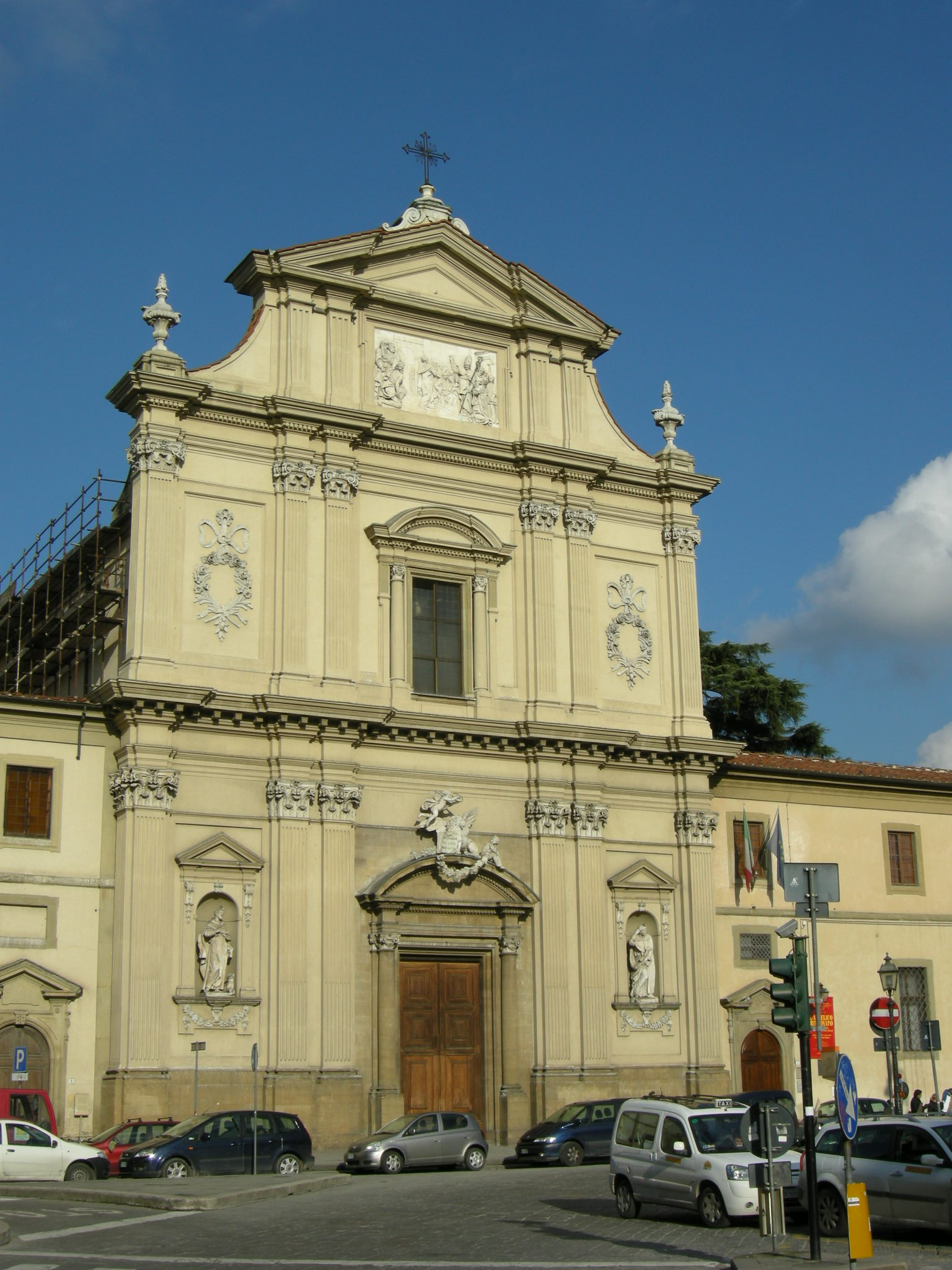 Chiesa di san marco, facciata